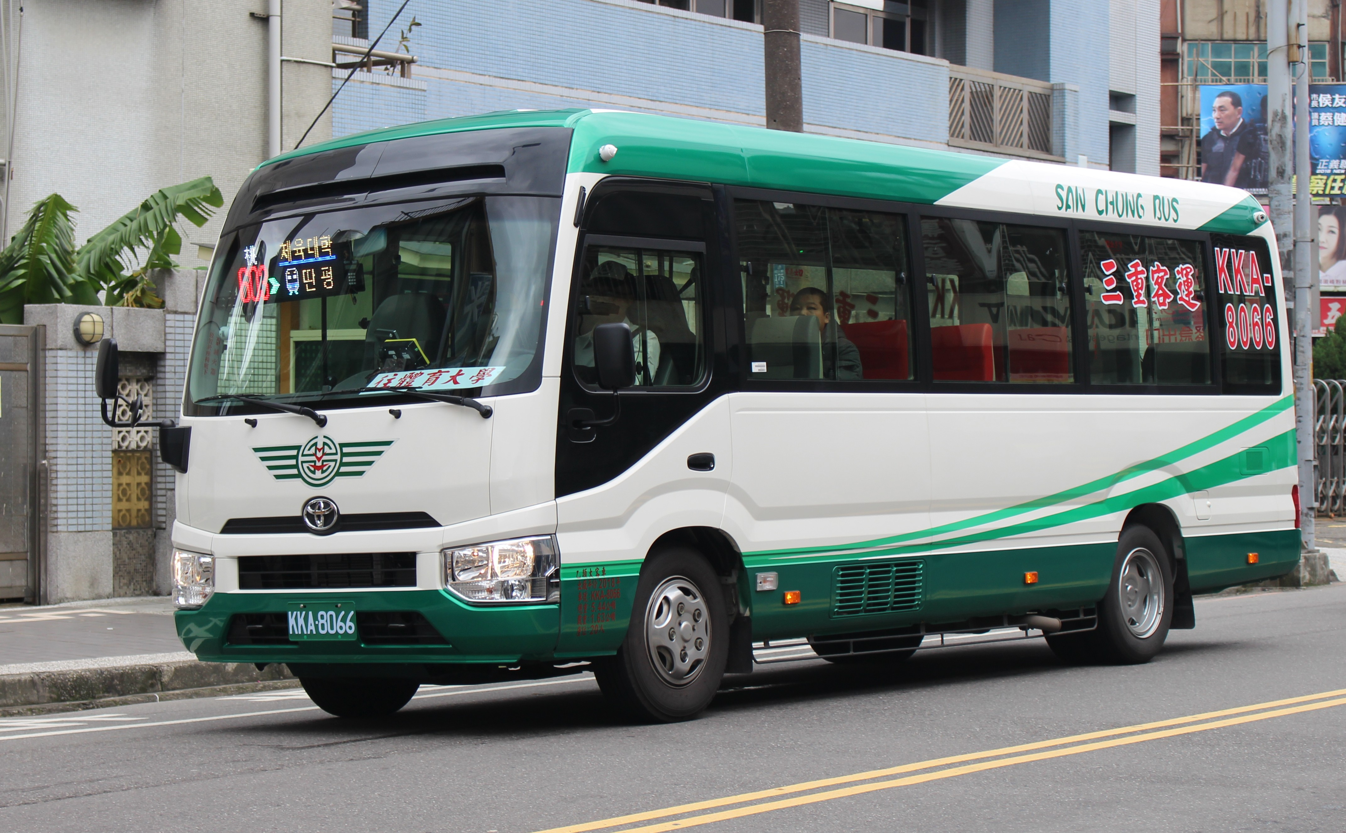 中文（台灣）: 三重客運2018年豐田Coaster中型巴士KKA-8066，行駛桃園市公車603線。